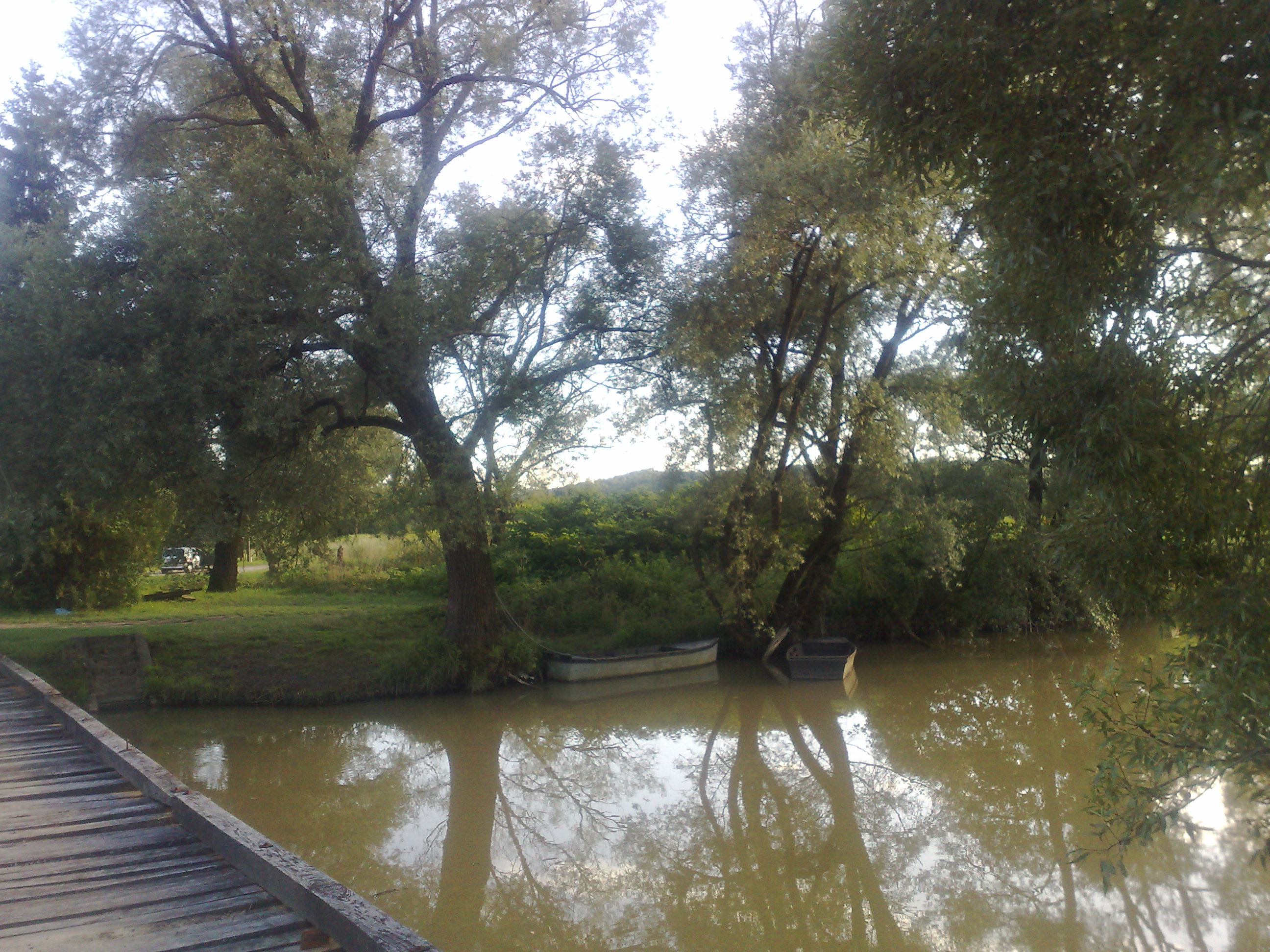 Alsószölnöknél a Rába eléri a magyar határt